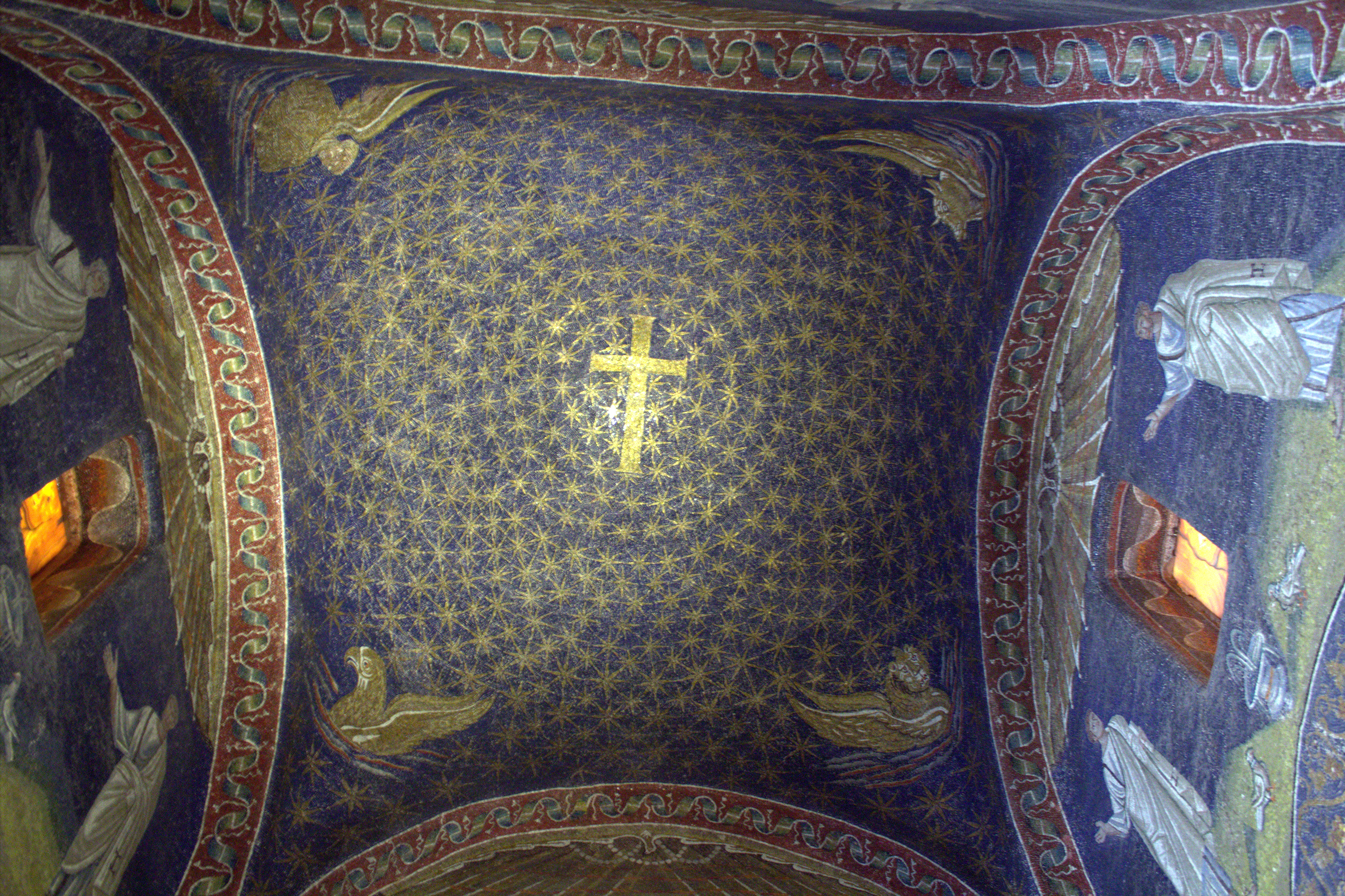 Soffitto del Mausoleo di Galla Placidia, Ravenna